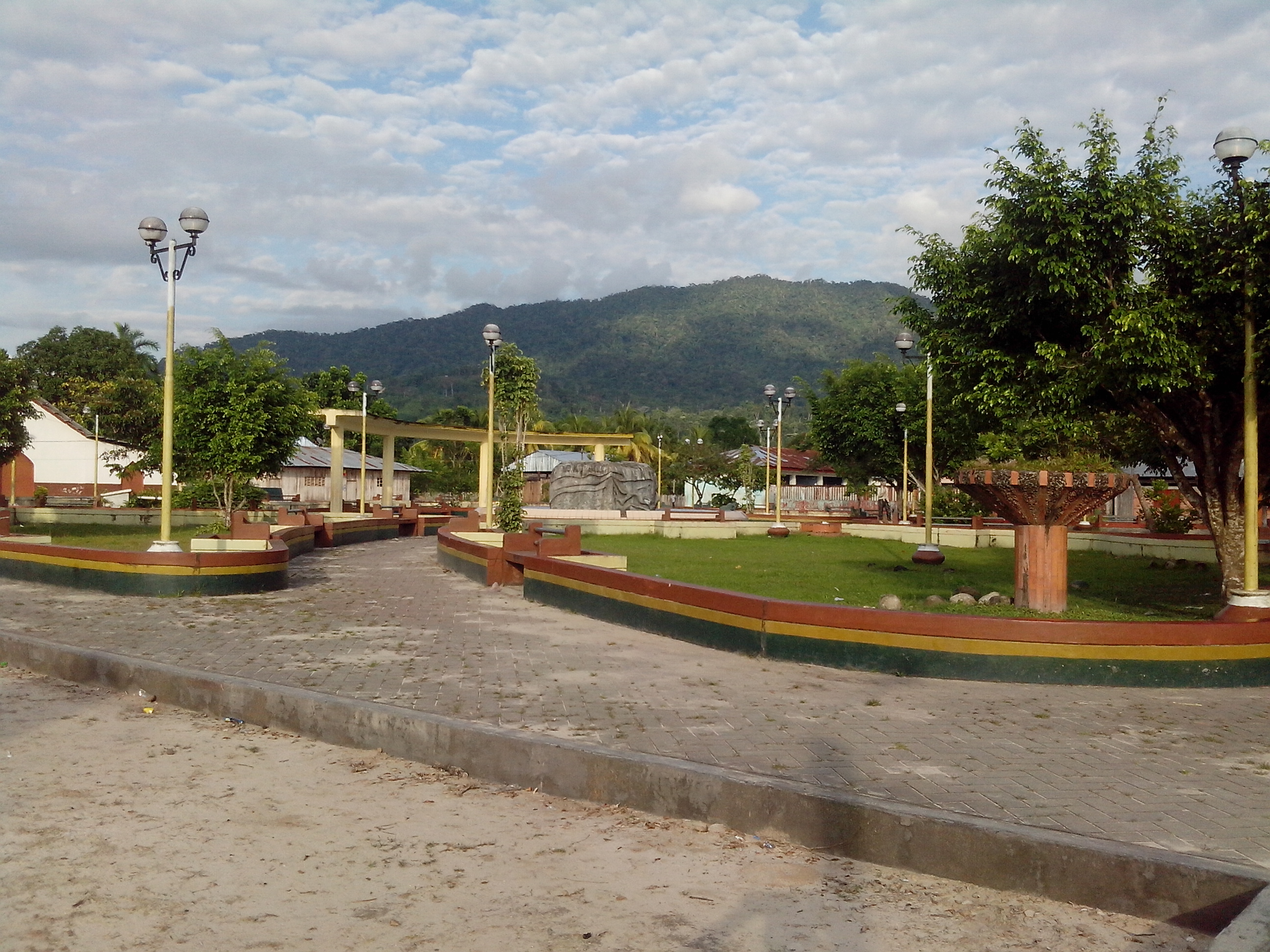 Vista de la plaza